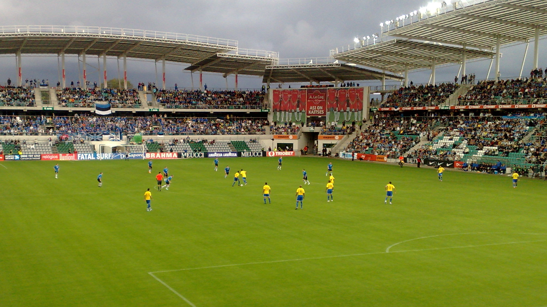 Brazil : Estonia match in A. Le Coq Arena, Tallinn.